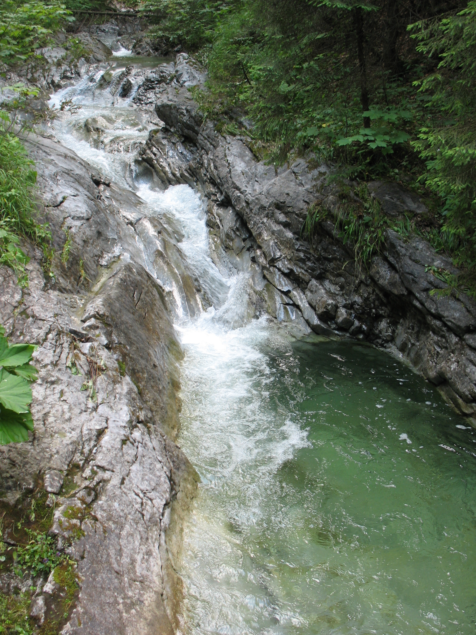 Biały Potok, Dolina Białego, Tatry